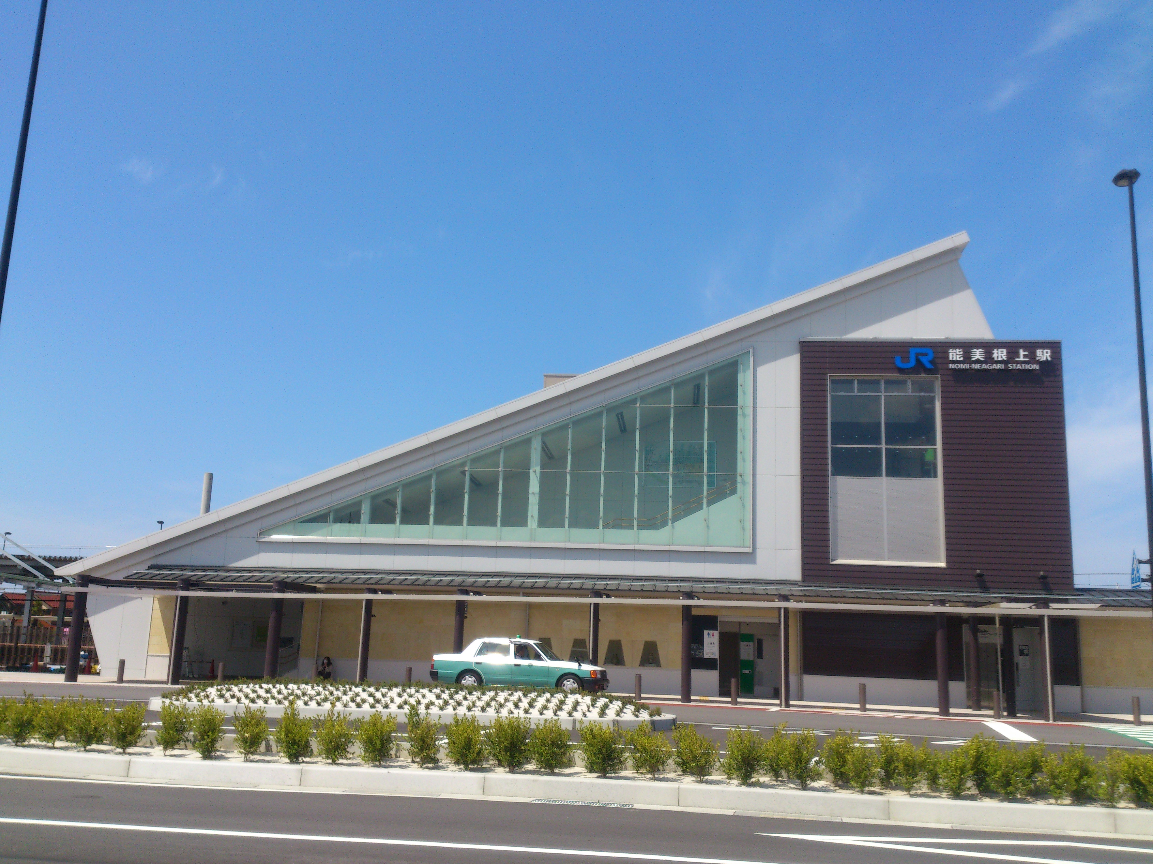 JR西日本北陸本線能美根上駅